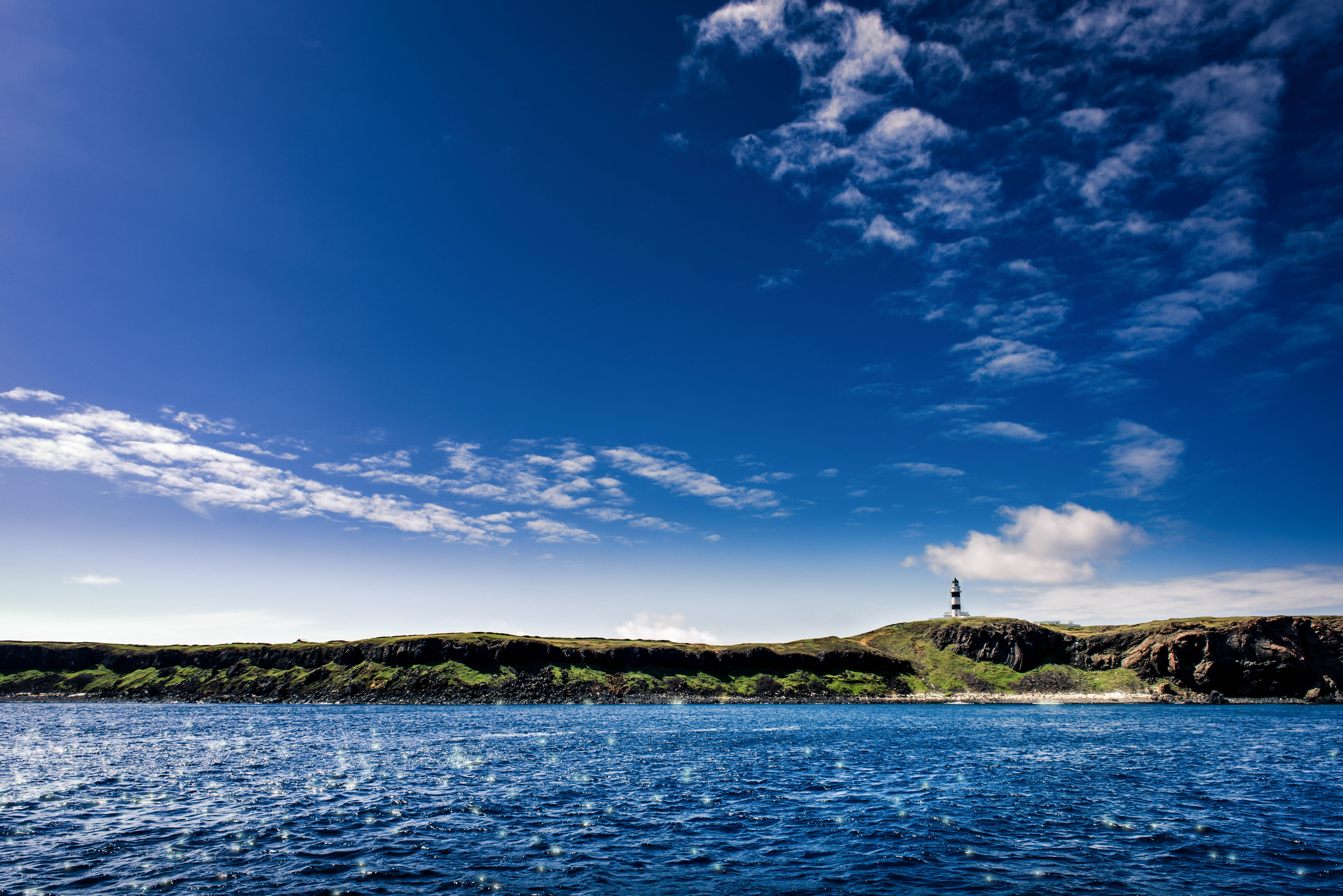 Dongji Island